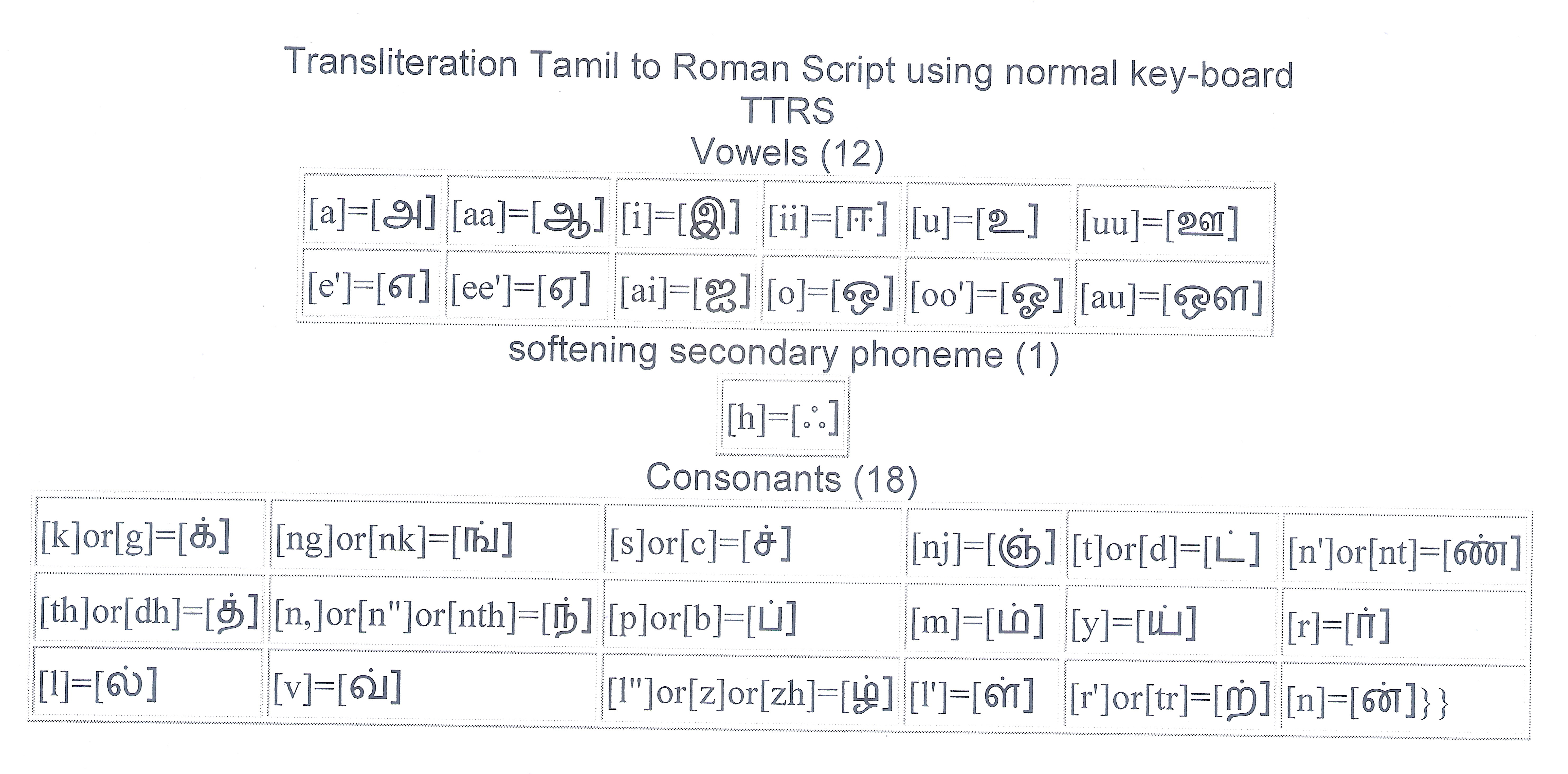 A key to write Tamil scripts in English scripts to articulate the Tamil phoneme more or less to produce the same sound. This is based on Arwi script. தமிழ் எழுத்துக்களை அங்கில எழுத்துக்களில் சிறப்புக் குறியீடுகளைப் பயன்படுத்தாமல் தட்டச்சு விசைப்பலகை எழுத்துக்களைக் கொண்டே எழுத உதவும் குறிநீடுகள்.